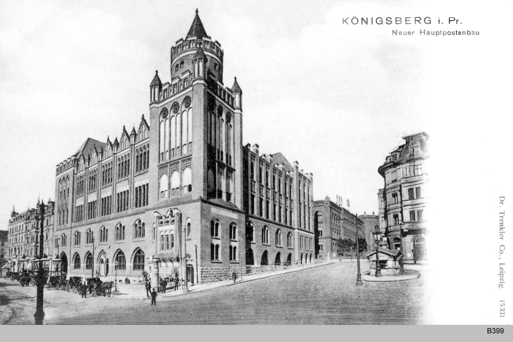 Königsberg